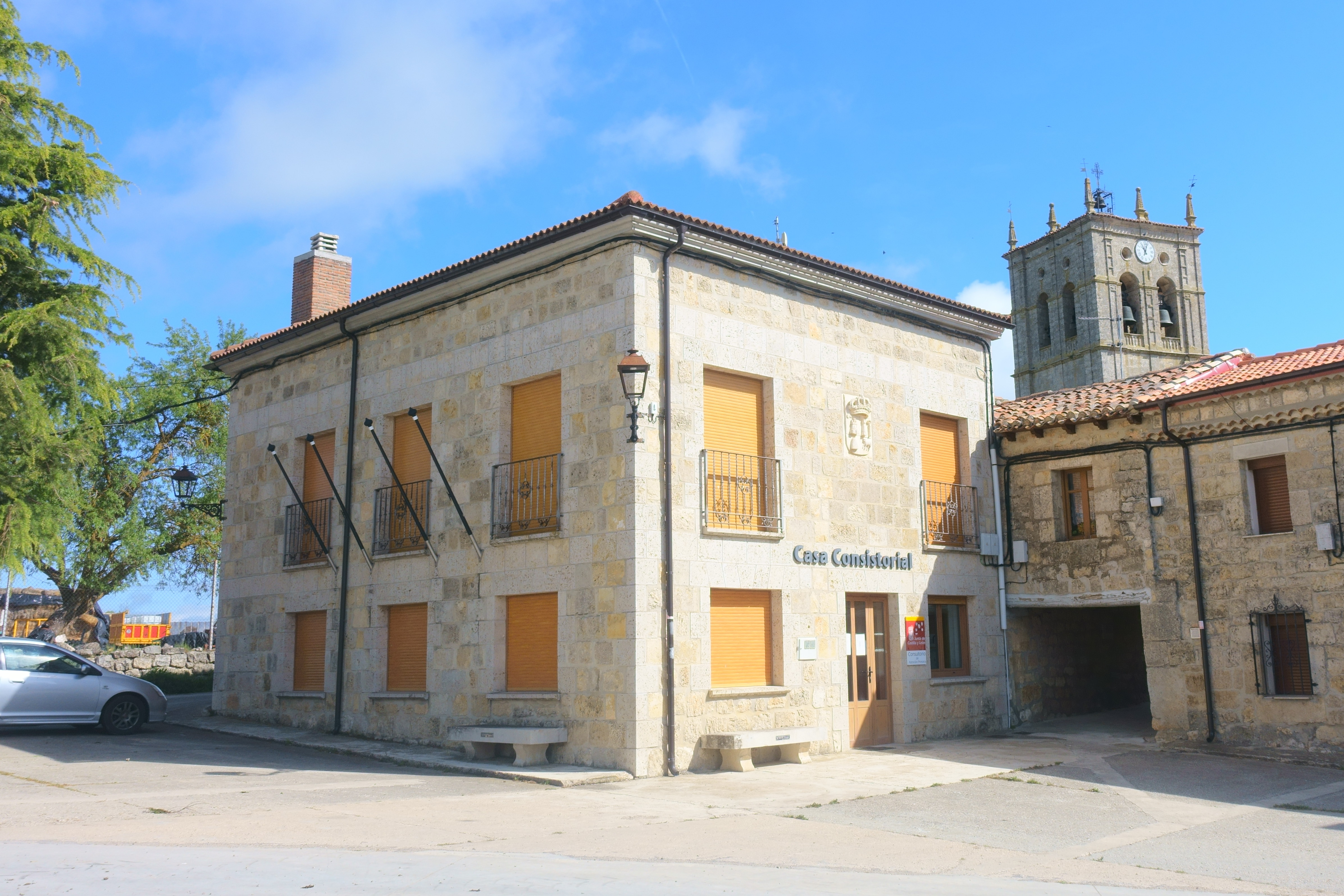 Casa consistorial de Pedrosa del Páramo (Burgos, España).